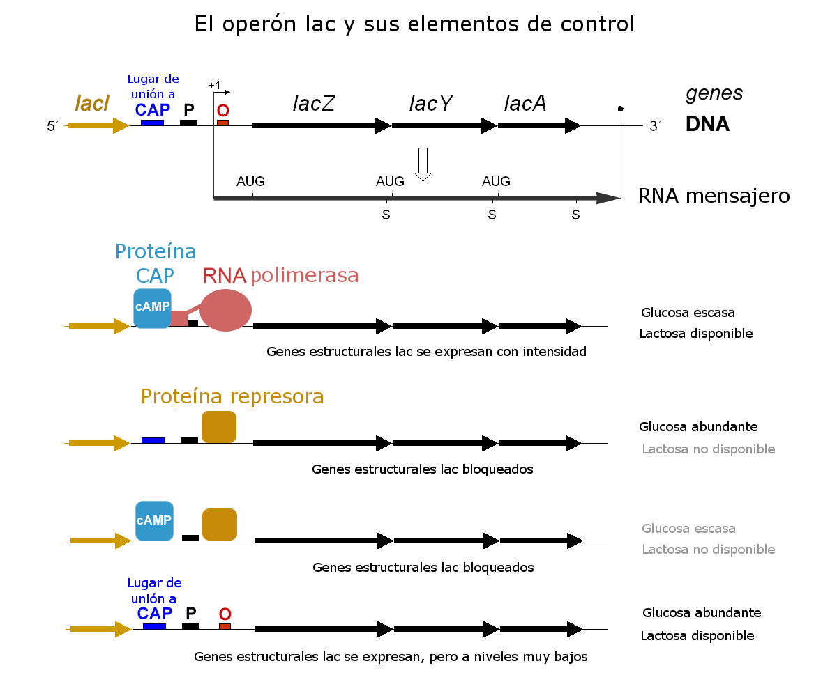 Esquema de funcionamiento del operón lac a través de sus distintos elementos de control.